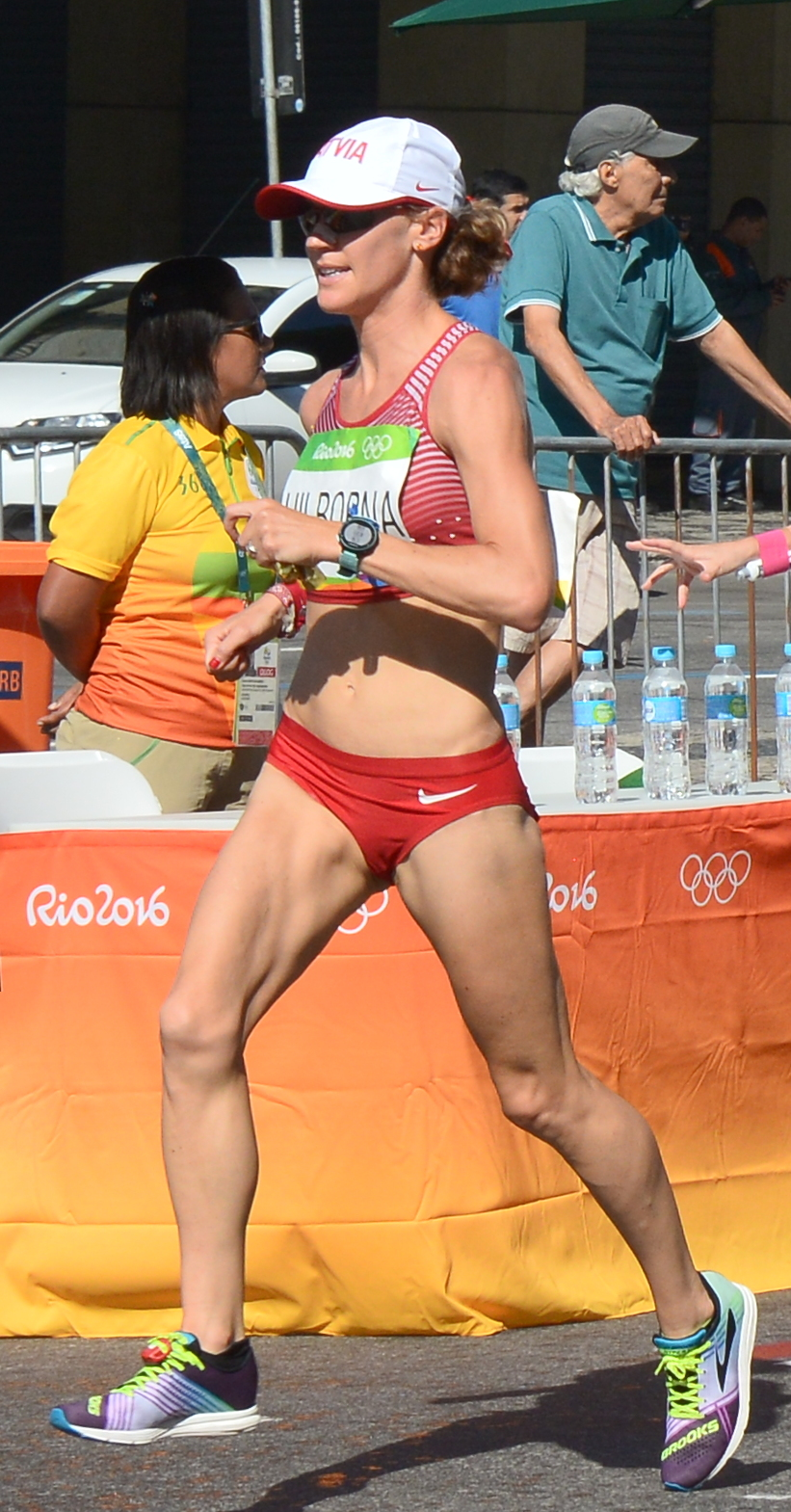 Passage du marathon des jeux olympiques de Rio 2016 dans le centre de Rio